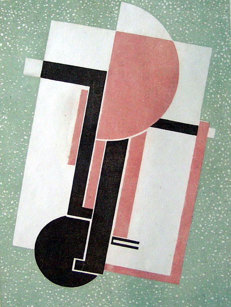 Litografie ze souboru Vyšinutá rovnováha (1926). Ze sbírek Městské galerie Vysoké Mýto Template:Cfrs